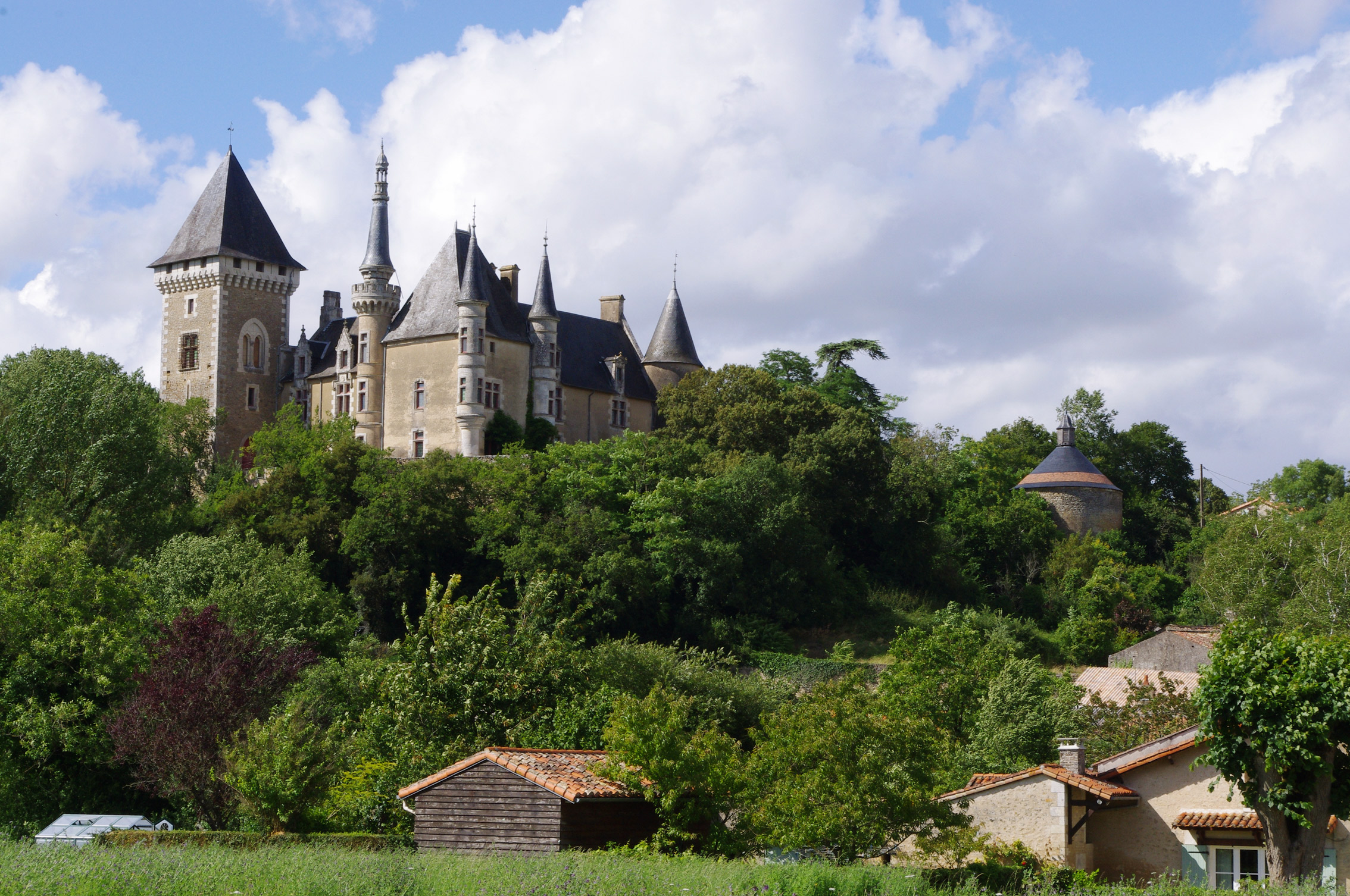 Le château d'Aigne, à côté d'Iteuil, Vienne, France